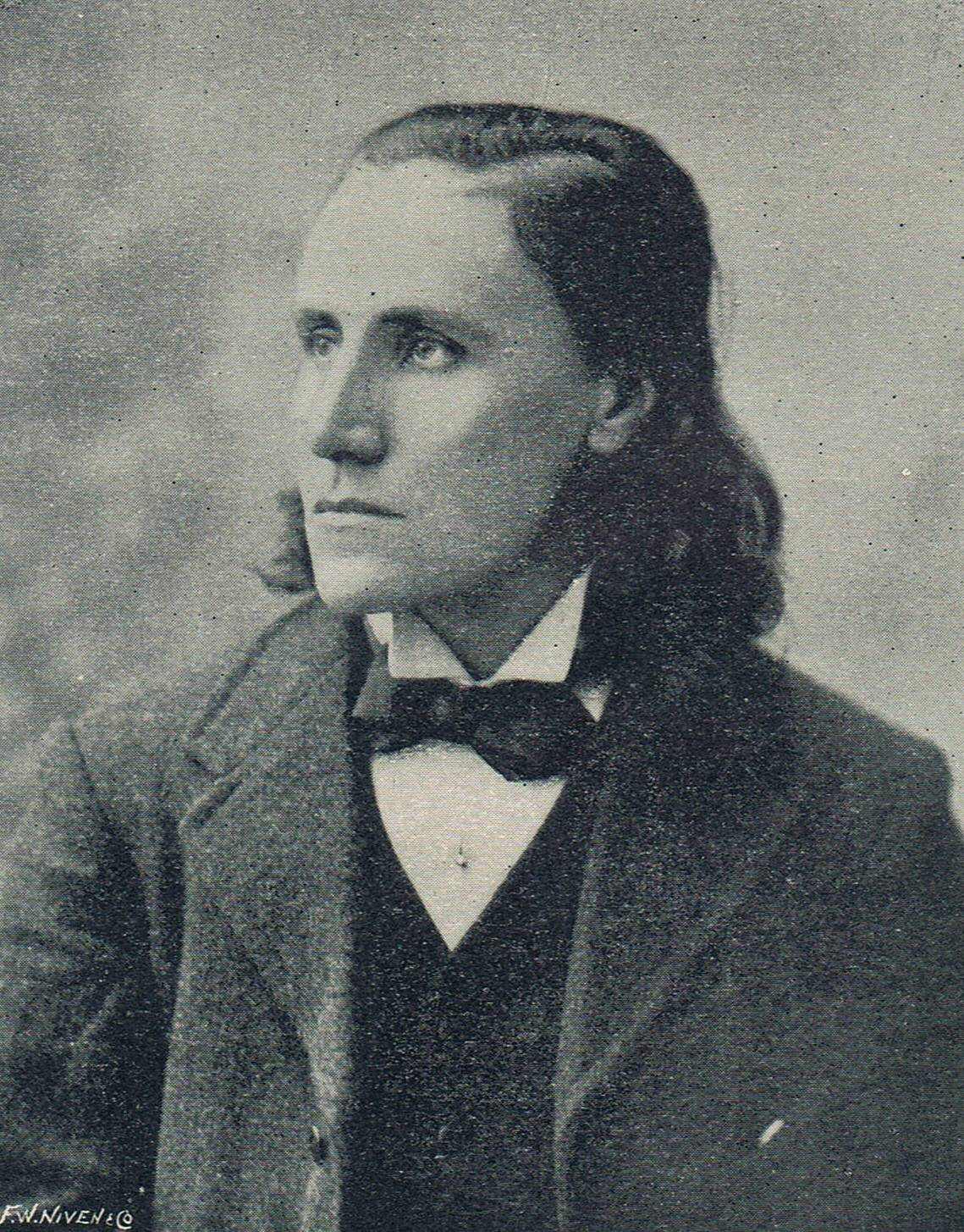 Frederick Vosper